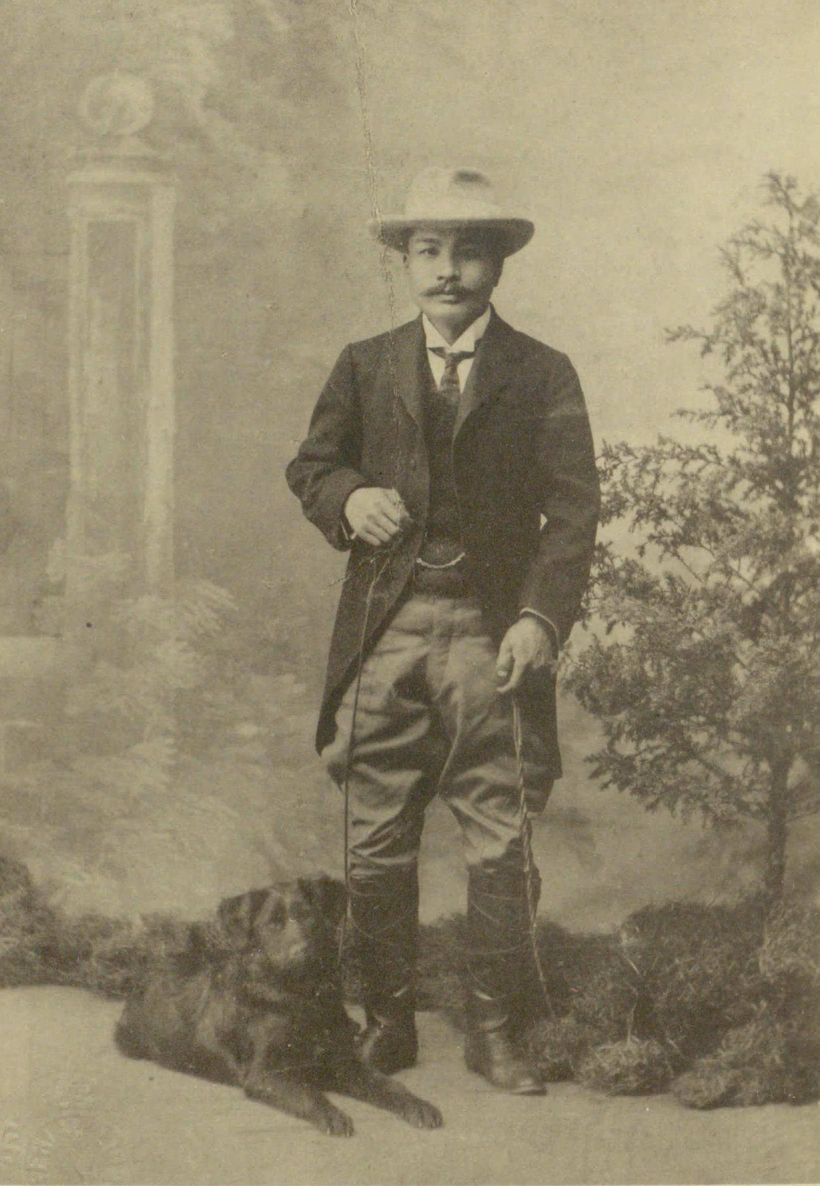 亀井陸良 明治36年頃